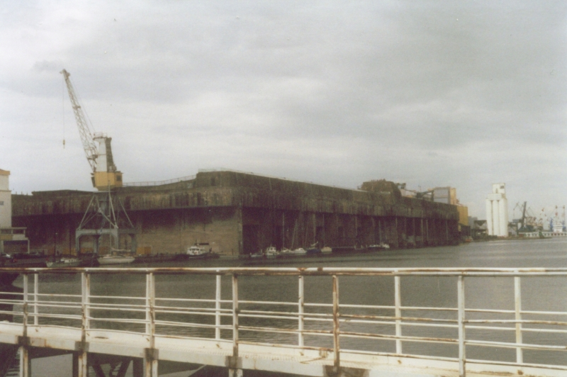 submarine_base_st.nazaire